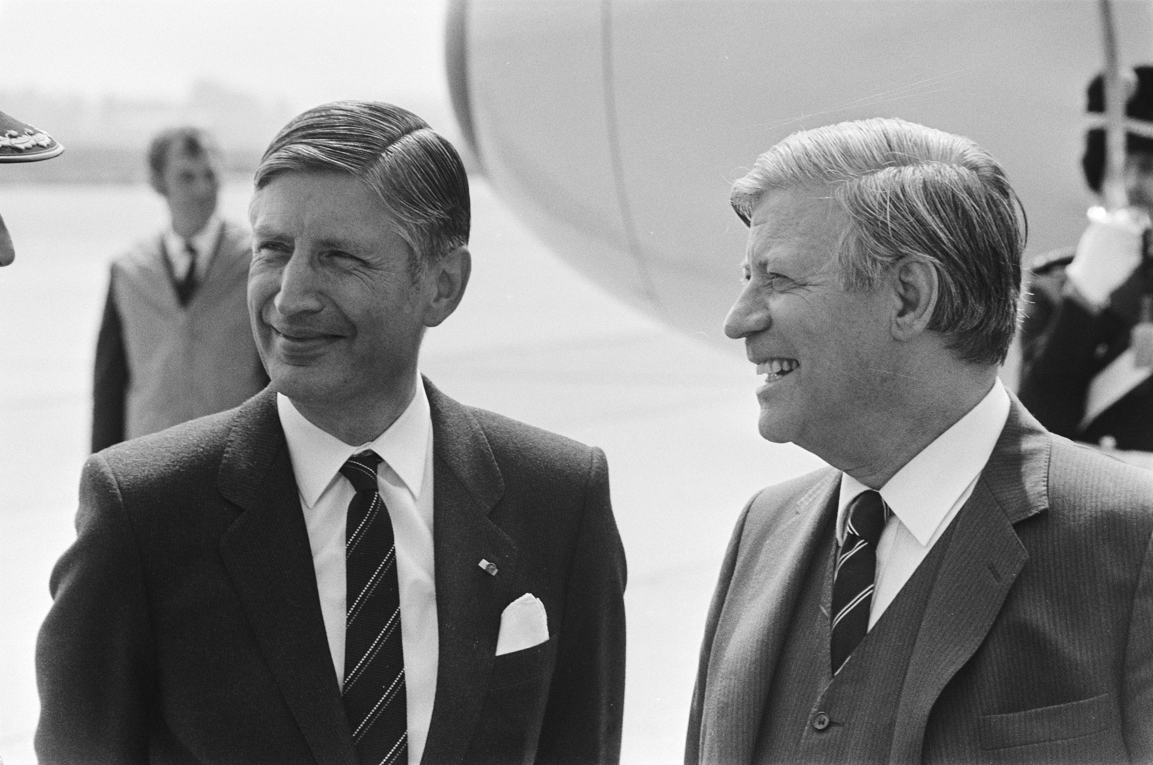 Collectie / Archief : Fotocollectie Anefo Reportage / Serie : [ onbekend ] Beschrijving : Bezoek Bondskanselier Helmuth Schmidt ; Van Agt (l) en Schmidt (close) Datum : 8 juli 1982 Locatie : Limburg, Valkenburg Trefwoorden : bezoeken Persoonsnaam : Bondskanselier Helmuth Schmidt Fotograaf : Antonisse, Marcel / Anefo Auteursrechthebbende : Nationaal Archief Materiaalsoort : Negatief (zwart/wit) Nummer archiefinventaris : bekijk toegang 2.24.01.05 Bestanddeelnummer : 932-2405